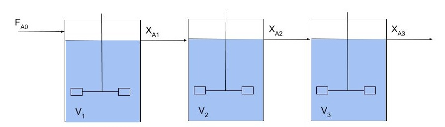 Nahaste perfektuko erreaktoreen bateria